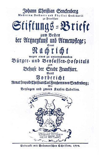 Titelblatt des Stiftungsbriefs für die Dr. Senckenbergische Stiftung von 1770. Der erste Stiftungsbrief ging auf 1763 zurück.